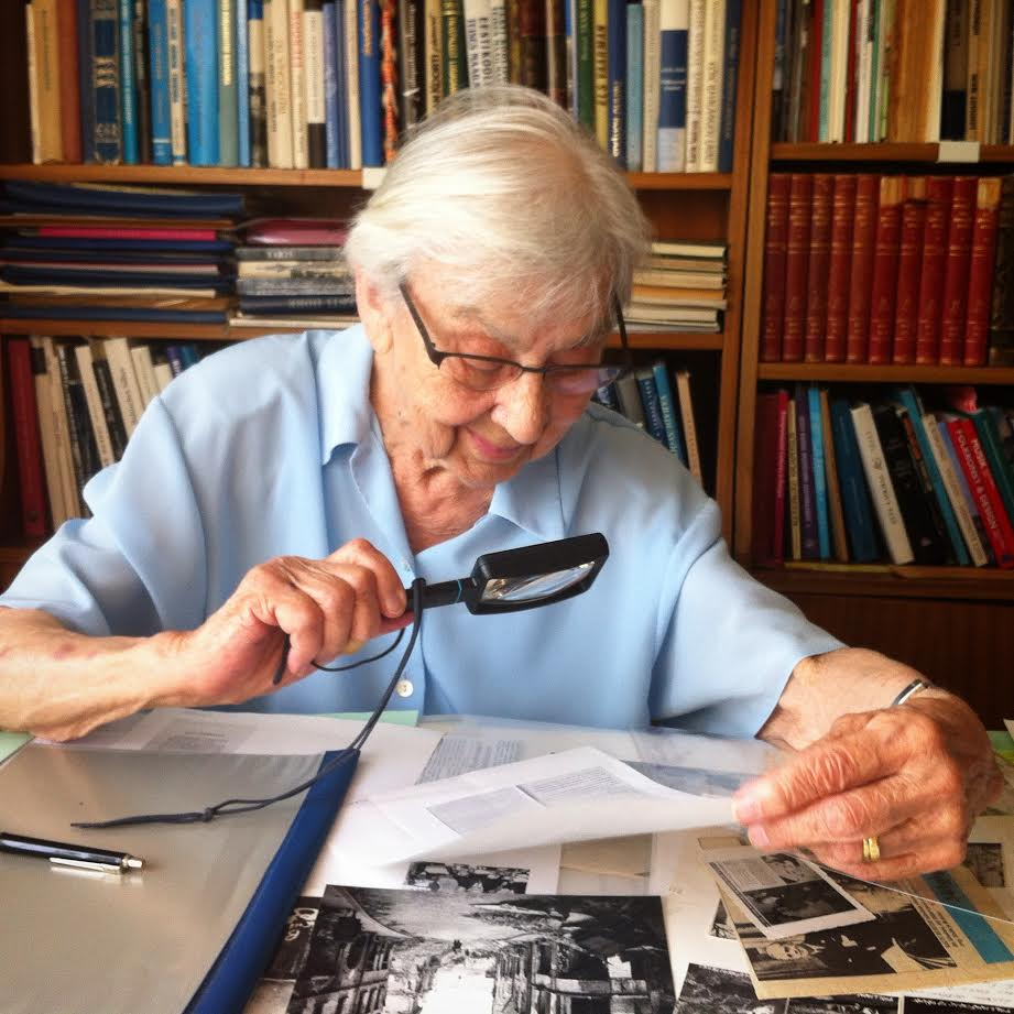 En foto gjort i Liljeholmen. Mai Raud-Pähn tittar närmare en bild som vi senare använde i vår utställning.